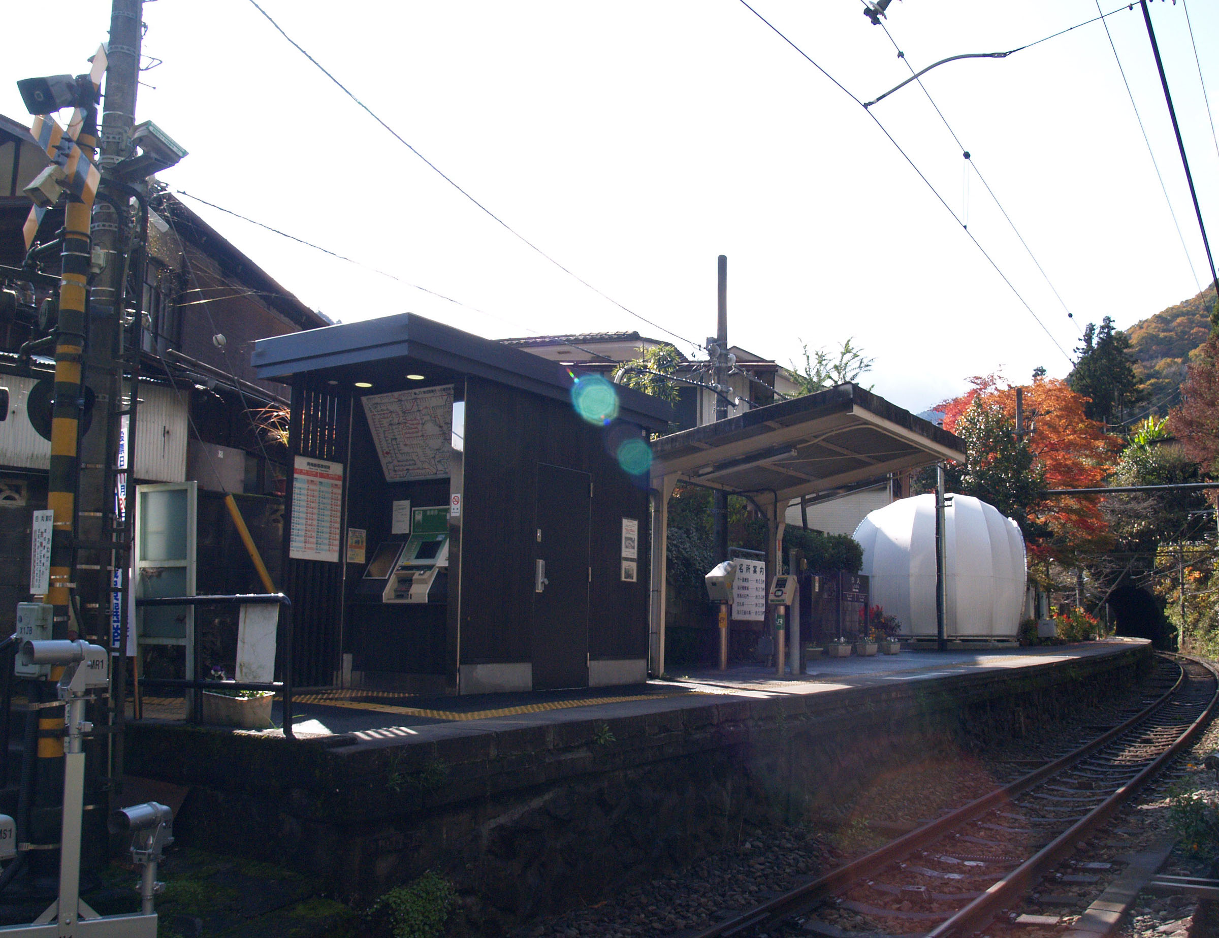 白丸駅 (東京都)